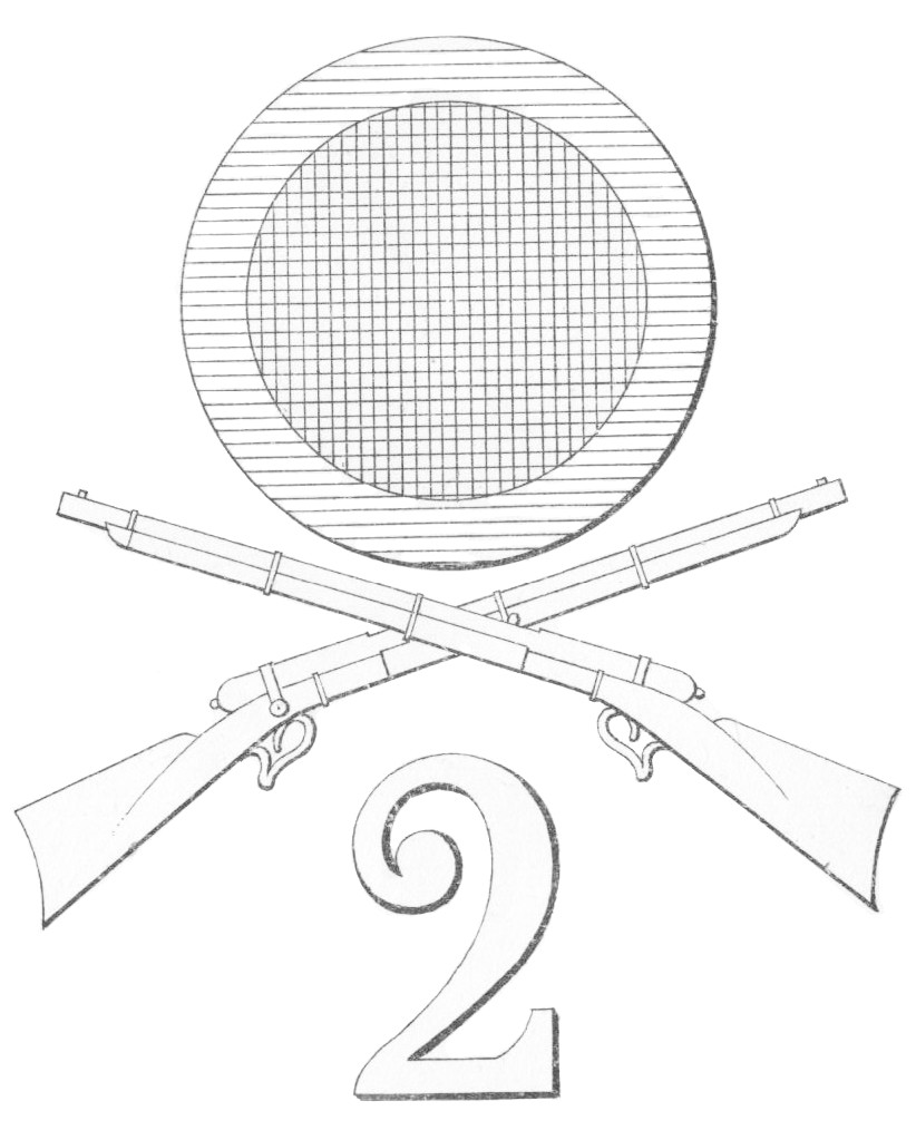 Insigne de shako de carabiniers ordonnance fédérale du 20 janvier 1869. Cet insigne sera en vigueur jusqu'au modèle 1898.